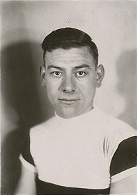 Roger Bisseron, portrait atelier (cycliste)